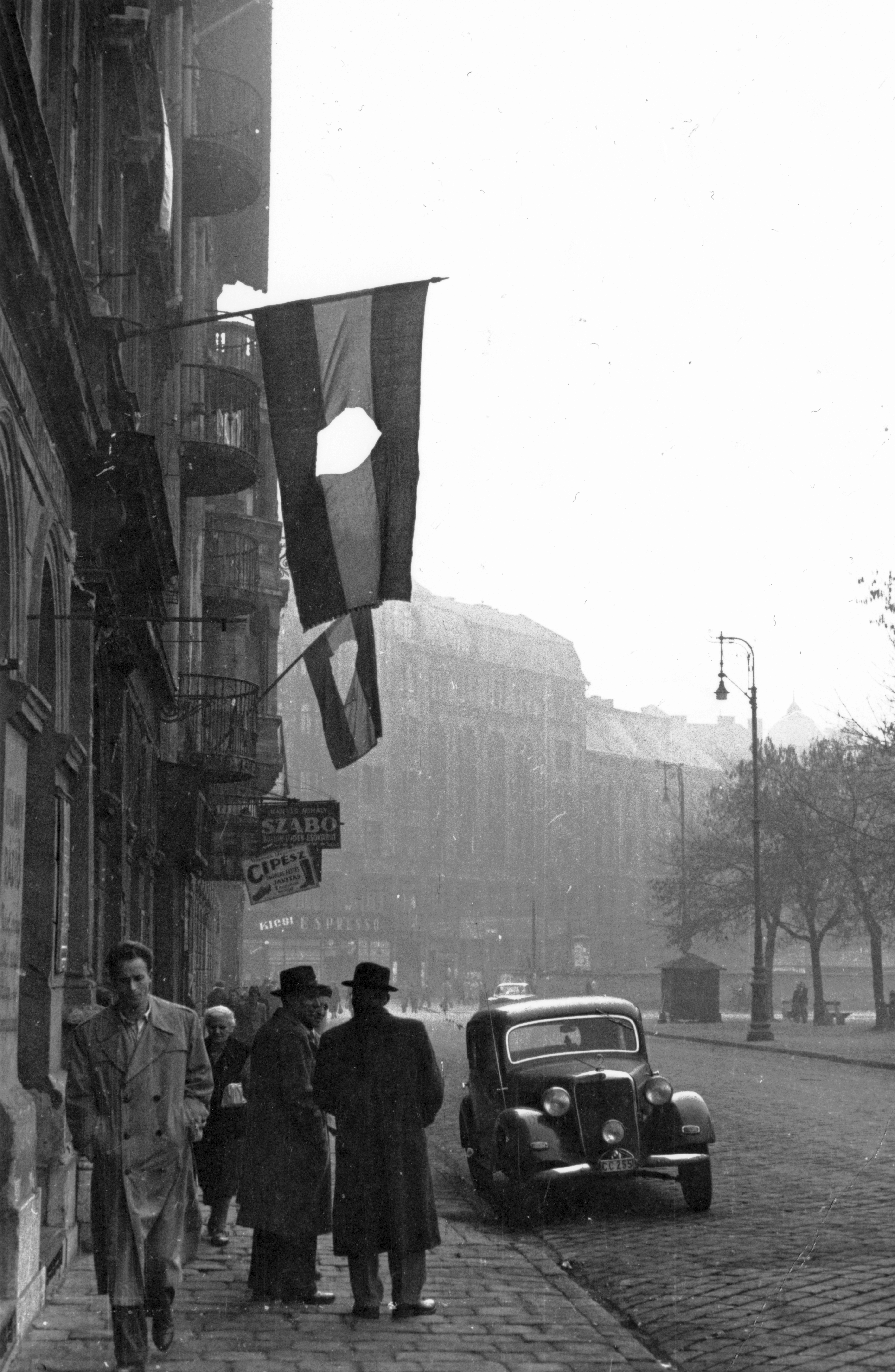 II. János Pál pápa (Köztársaság) tér a Vay Ádám utca felől a Népszínház utca felé nézve. Location: Hungary, Budapest VIII. Tags: flag, automobile, Mercedes-brand, Gerrman brand, street view, genre painting, revolution, lamp post, Budapest Title: II. János Pál pápa (Köztársaság) tér a Vay Ádám utca felől a Népszínház utca felé nézve.